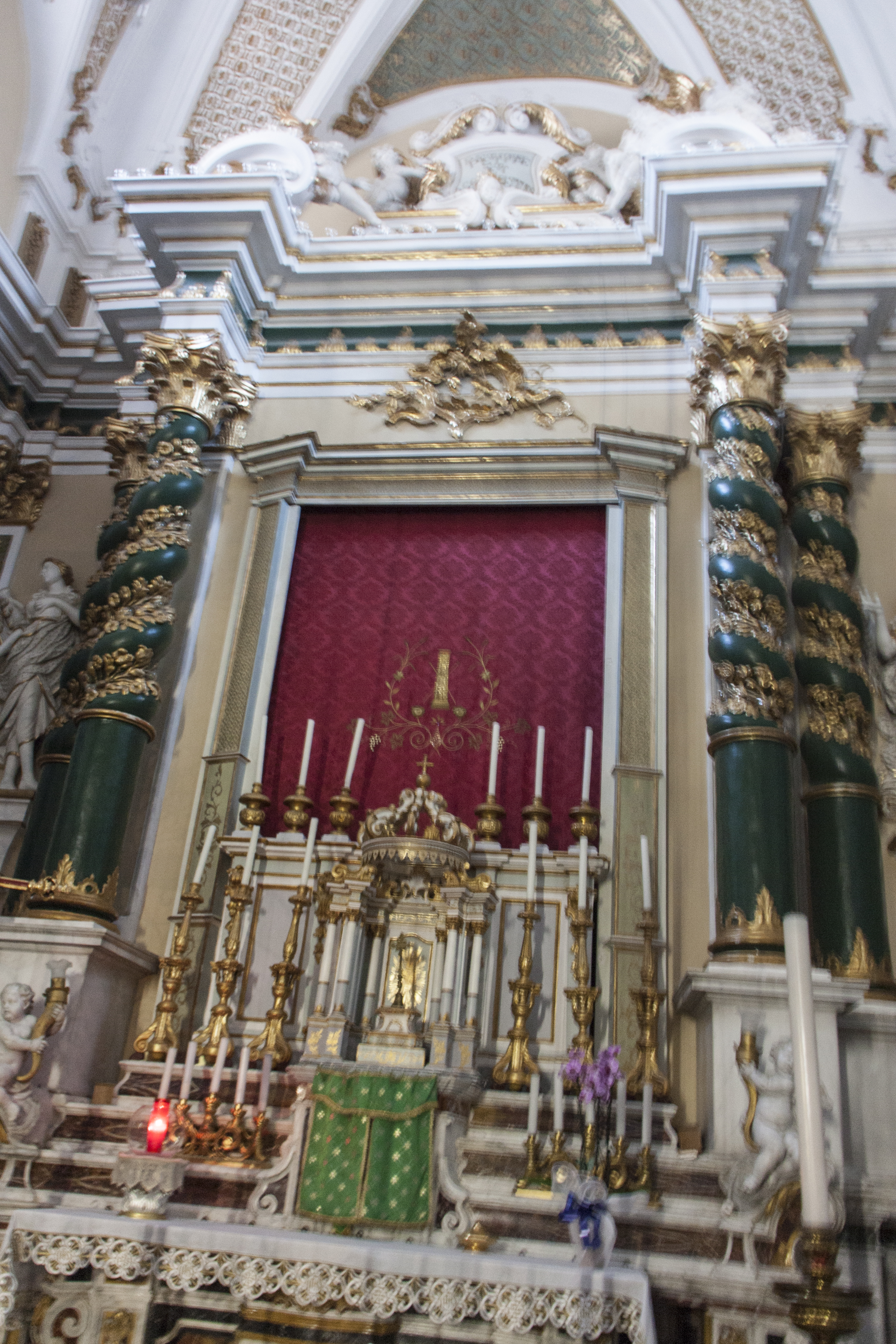 Basilica di Santa Maria Maggiore (interno)